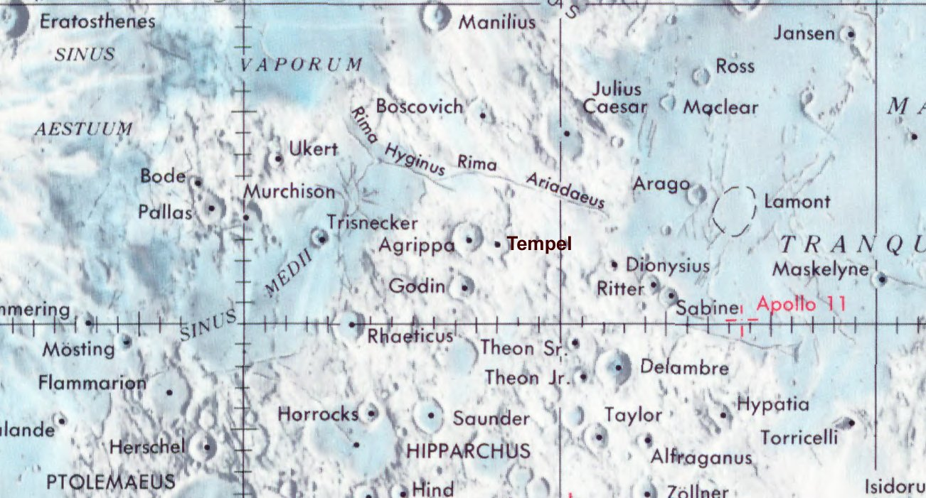 Cráter lunar Tempel. Localización. (Lunar Chart LPC1. Second Edition)